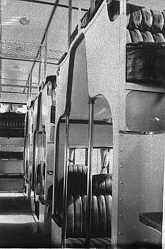 autoalveare